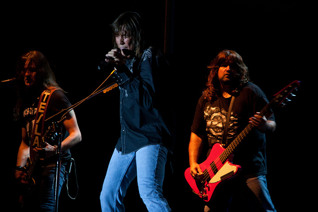 Emiliàn e rumagnòl: I Tesla dal viṿ in dal Luj dal 2010. In prim piaṅ al cantànt Jeff Keith, da drē i ś védan al basìsta Brian Wheat e al chitarìsta Dave Rude